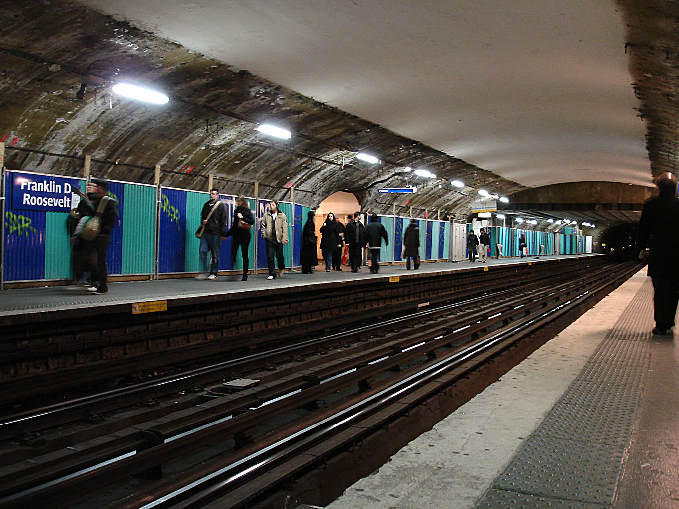 La station Franklin D. Roosevelt de la ligne 1 du métro de Paris en cours de décarrossage, France